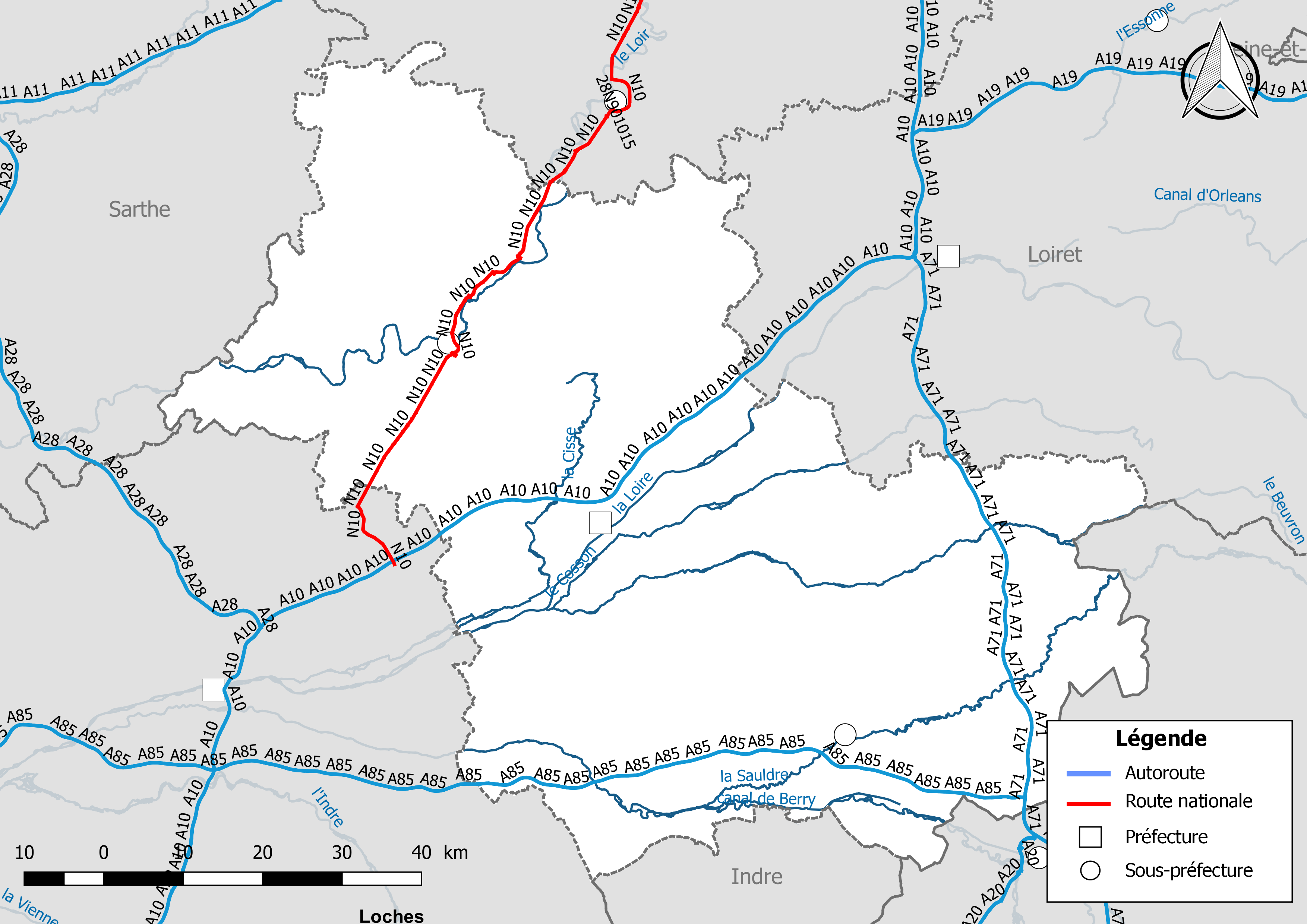 Carte du réseau routier national, constitué des autoroutes et des routes nationales, dans le département de Loir-et-Cher (France). Situation au 1er janvier 2019.